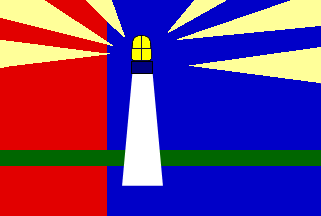 Bandera del municipio Puerto Cabello, estado Carabobo, Venezuela